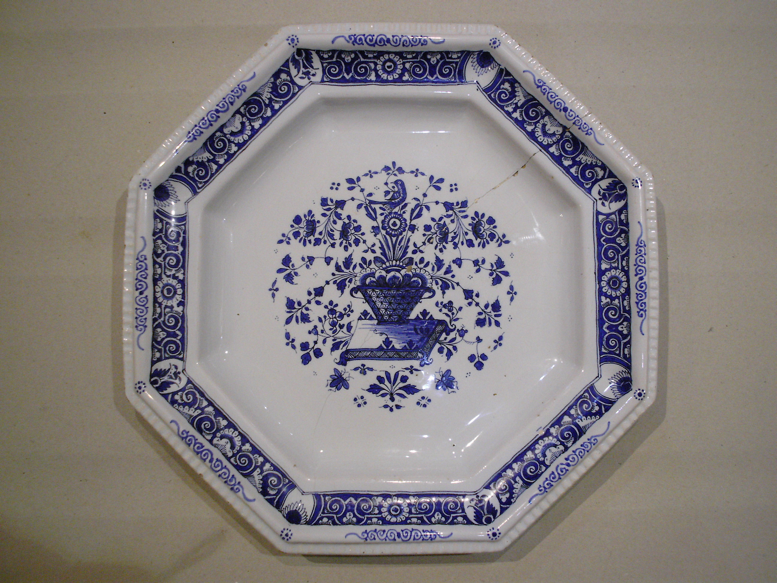 plat 45cm grand feu bleu de cobalt, collection privée, Musée du pain d'épice de Gertwiller